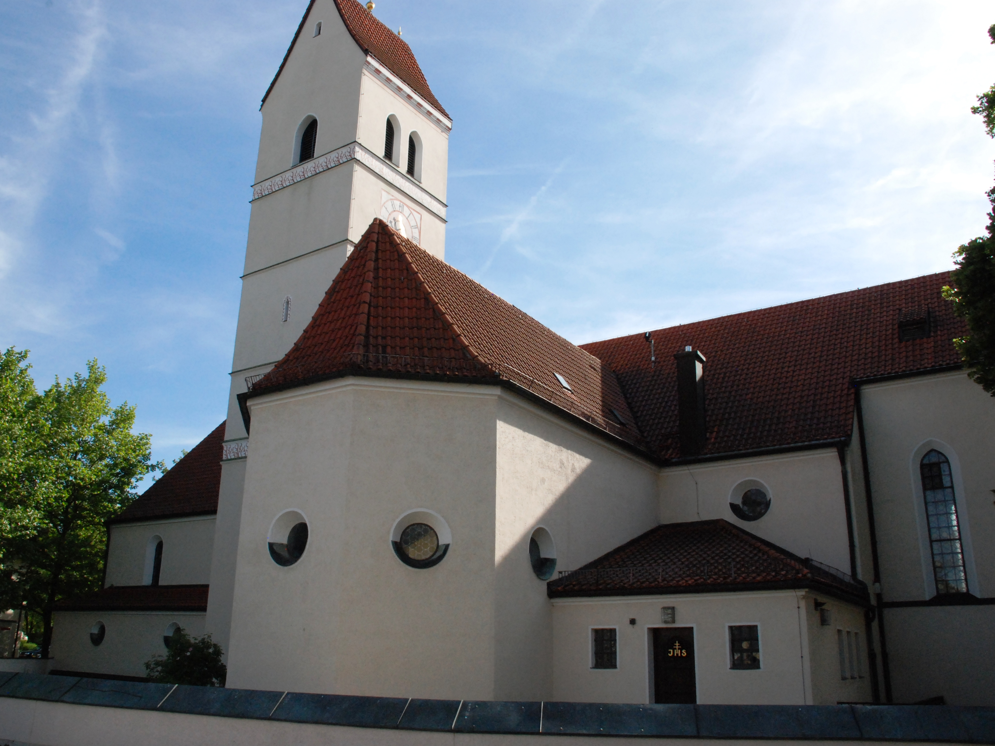 Denkmalgeschützte katholische Kirche St. Jakob in Feldkirchen, Landkreis München. Architekten Wilhelm Flaschenträger und Georg Berlinger